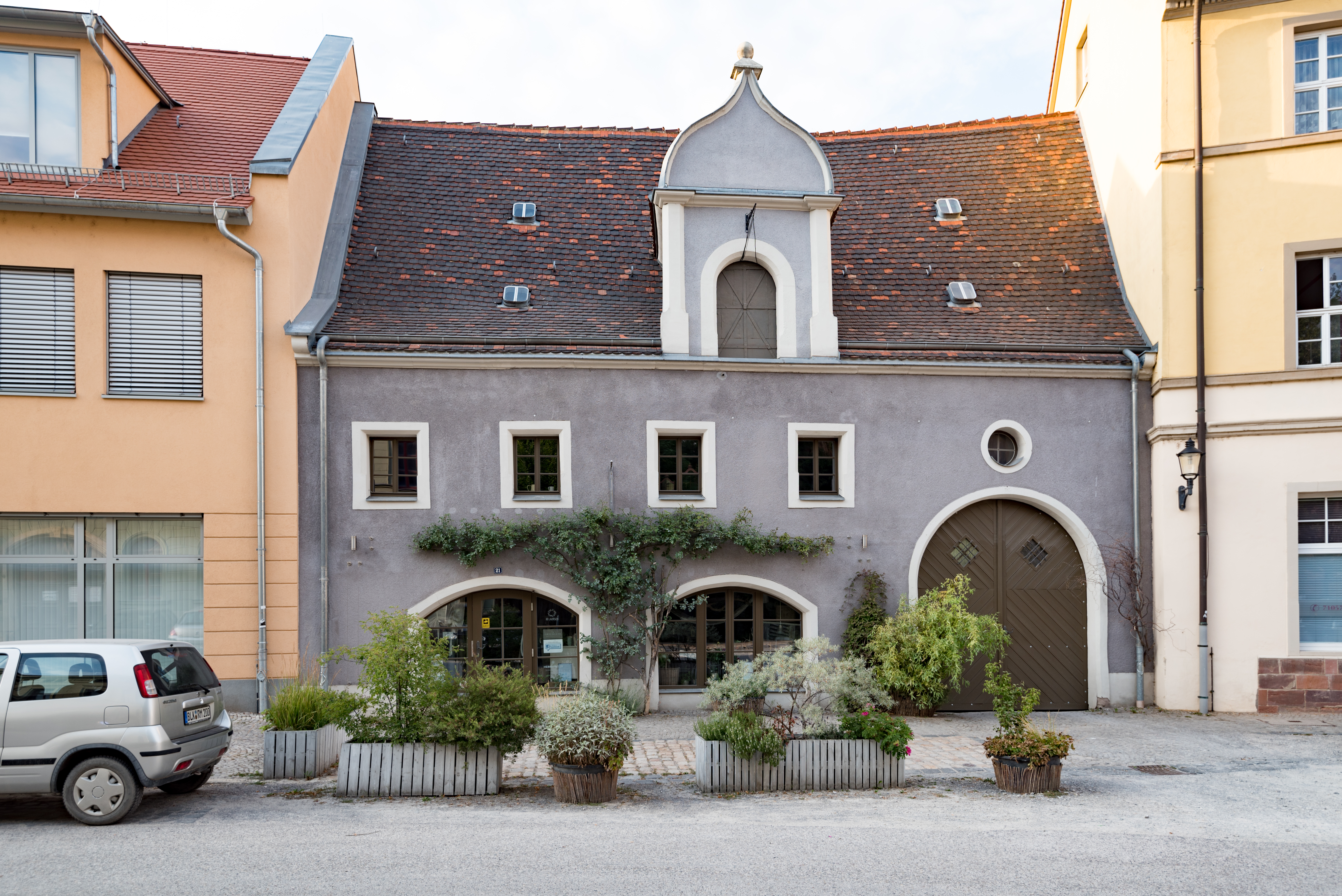 Naumburg (Saale), Reußenplatz 21